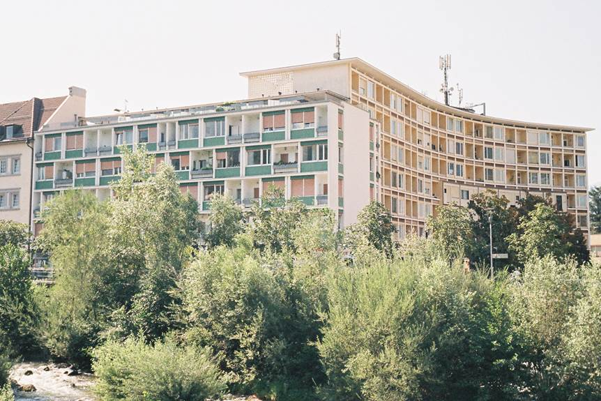 Das Meraner Eurotel wurde 1959 eröffnet und war das erste einer Serie von 35 weiteren Hotels die nach diesem Vorbild entstanden sind.